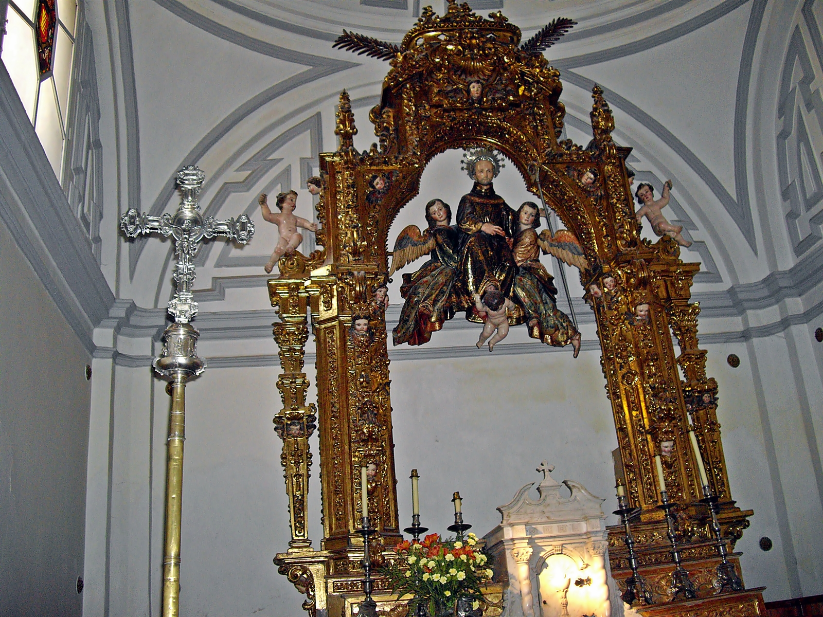 Figura de San Pedro Regalado en el interior de la iglesia de El Santísimo Salvador